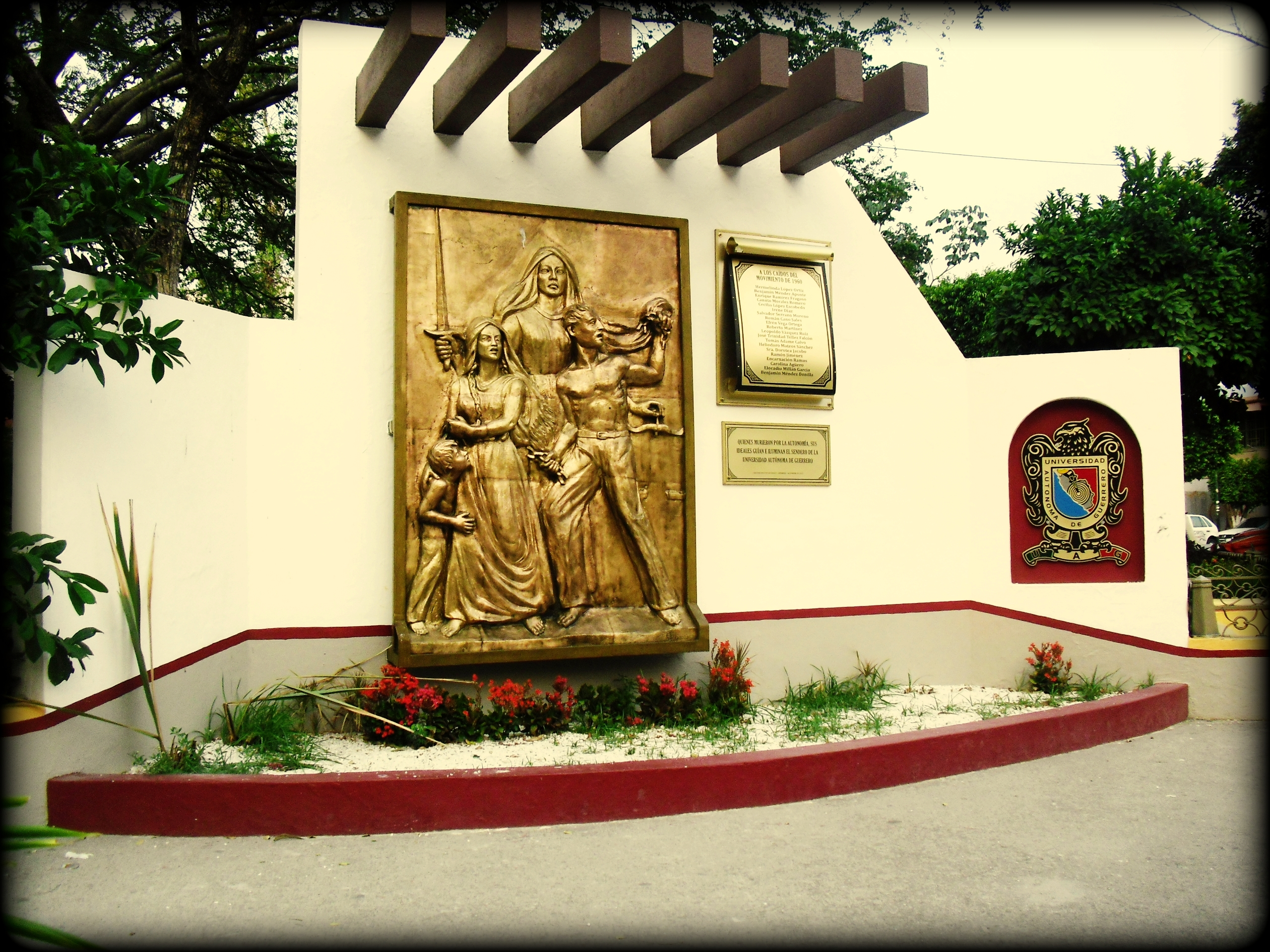 Conmemoración a los caídos en la matanza del 30 de diciembre de 1960 por ordenes del General Raúl Caballero Aburto